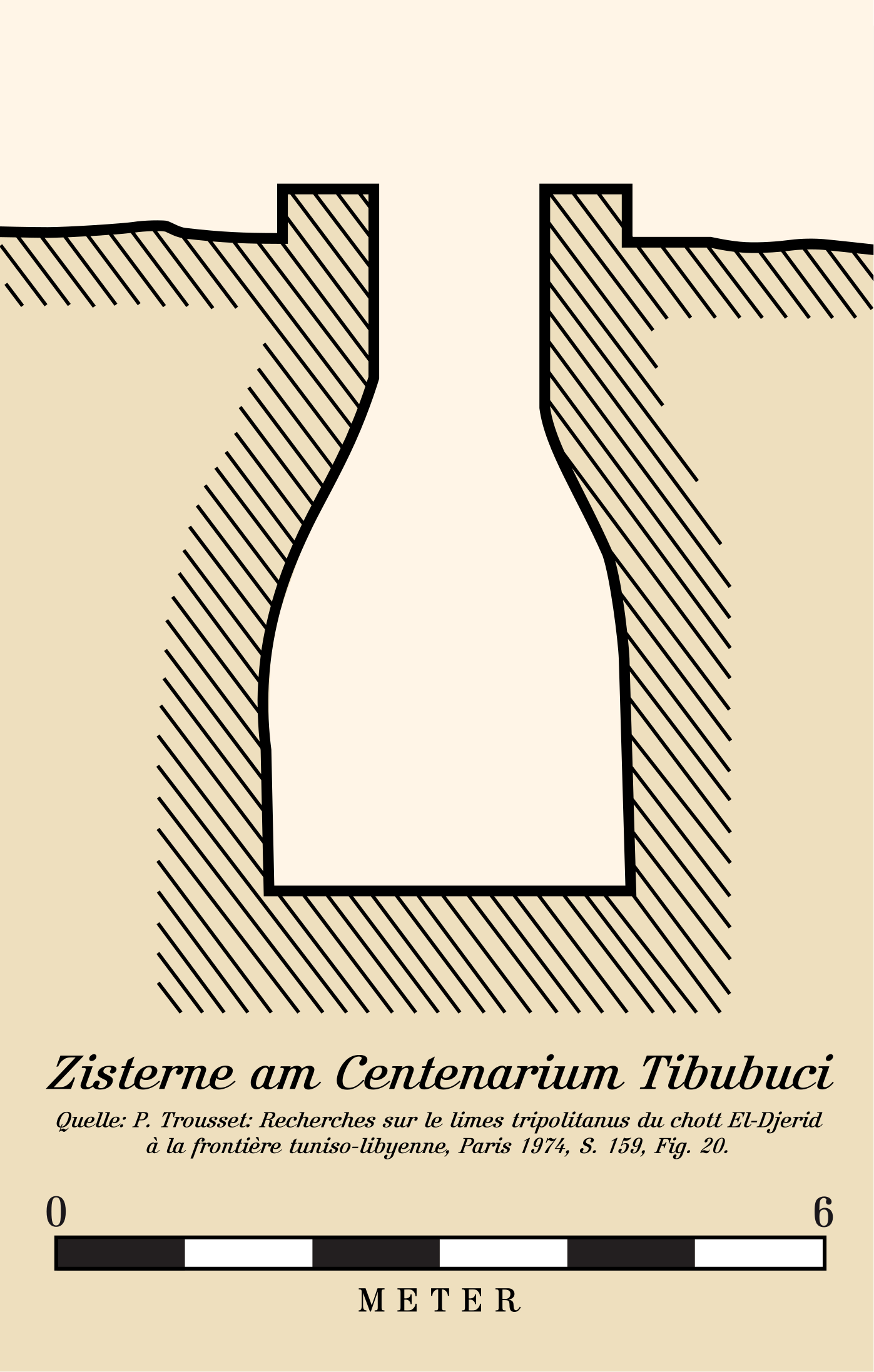 Zisterne am Centenarium Tibubuci, Südtunesien. Die im Flussbett gefundene und anschließend restaurierte Zisterne besitzt die Form einer 6,70 Meter hohen Flasche, deren Basis 5,60 Meter im Durchmesser zählt. Am Grund befinden sich zwei gegenüberliegende, zwei Meter hohe und 1,75 Meter breite überwölbte Erweiterungen des Tiefbaubauwerks mit einer Gesamtlänge von 9,50 Metern. Die aus Steinmaterial und Kalkmörtel errichtete Anlage kann 60.000 Liter fassen und besitzt eine sehr starke Außenschicht aus wasserdichtem römischen Beton.